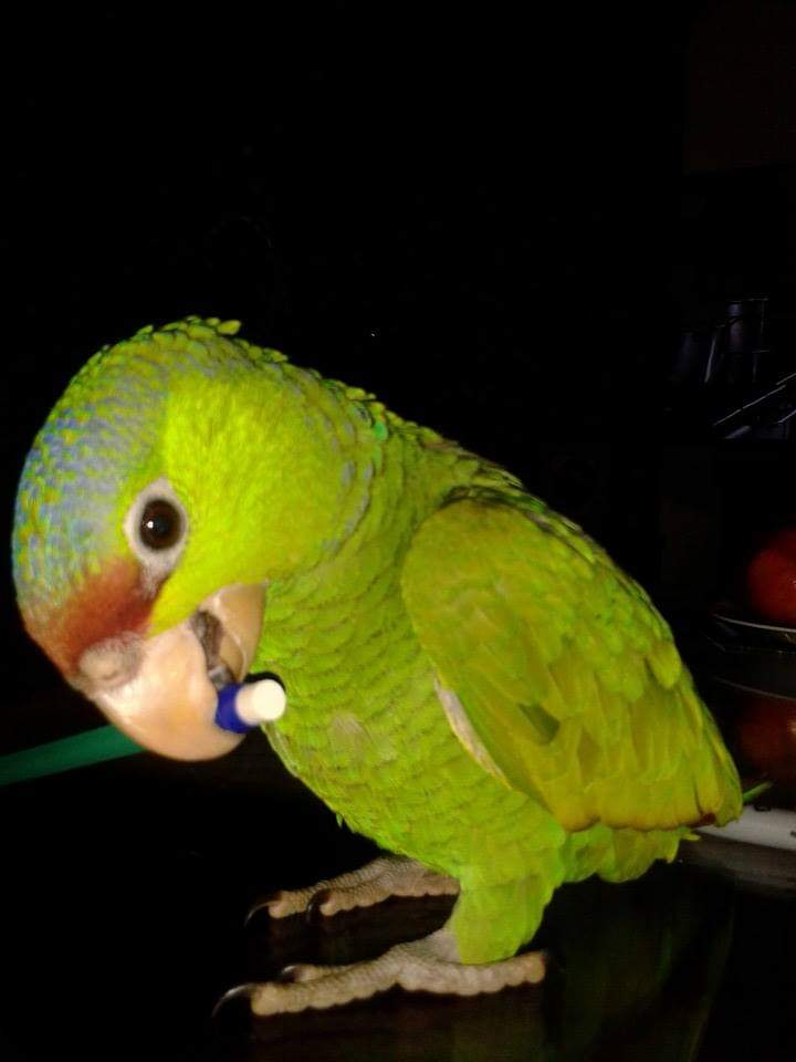 El mejor xd